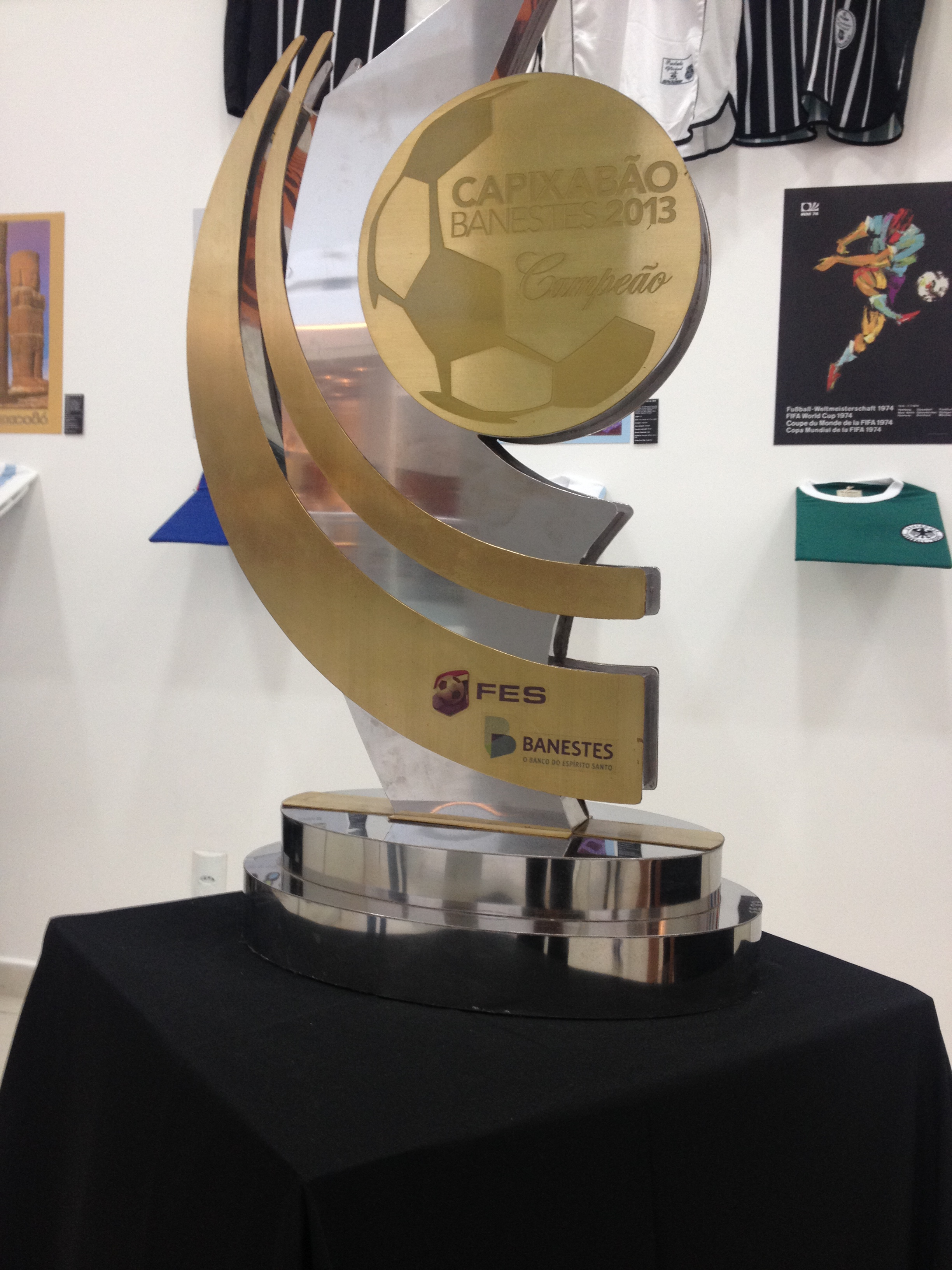 Troféu de Campeão Capixaba de 2013 em exposição em Vila Velha.